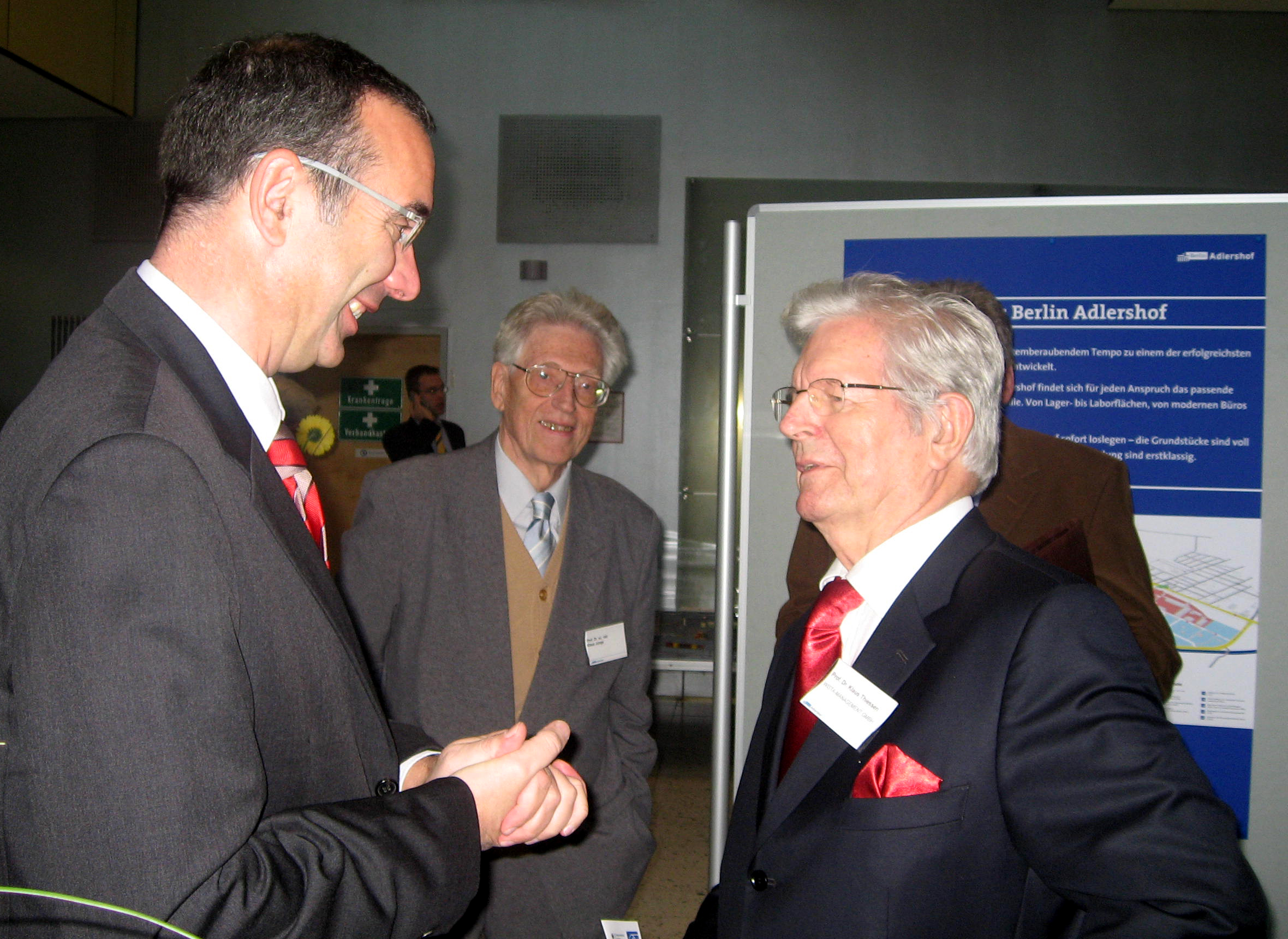 Prof. Klaus Thiessen zusammen mit dem Berliner Wirtschaftssenator Harald Wolf